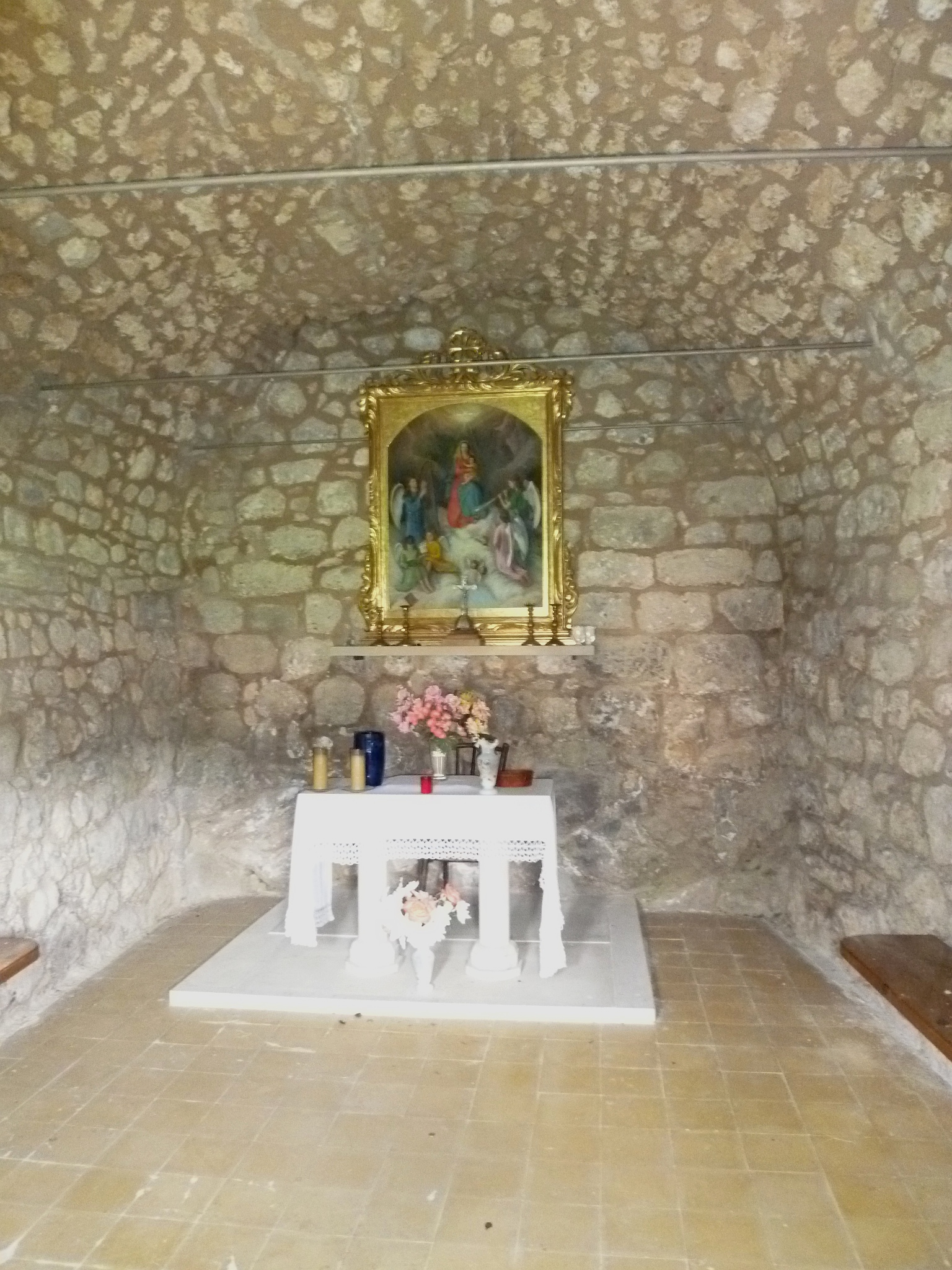 Santuari de la Mare de Déu dels Àngels (Sant Llorenç de Morunys): interior